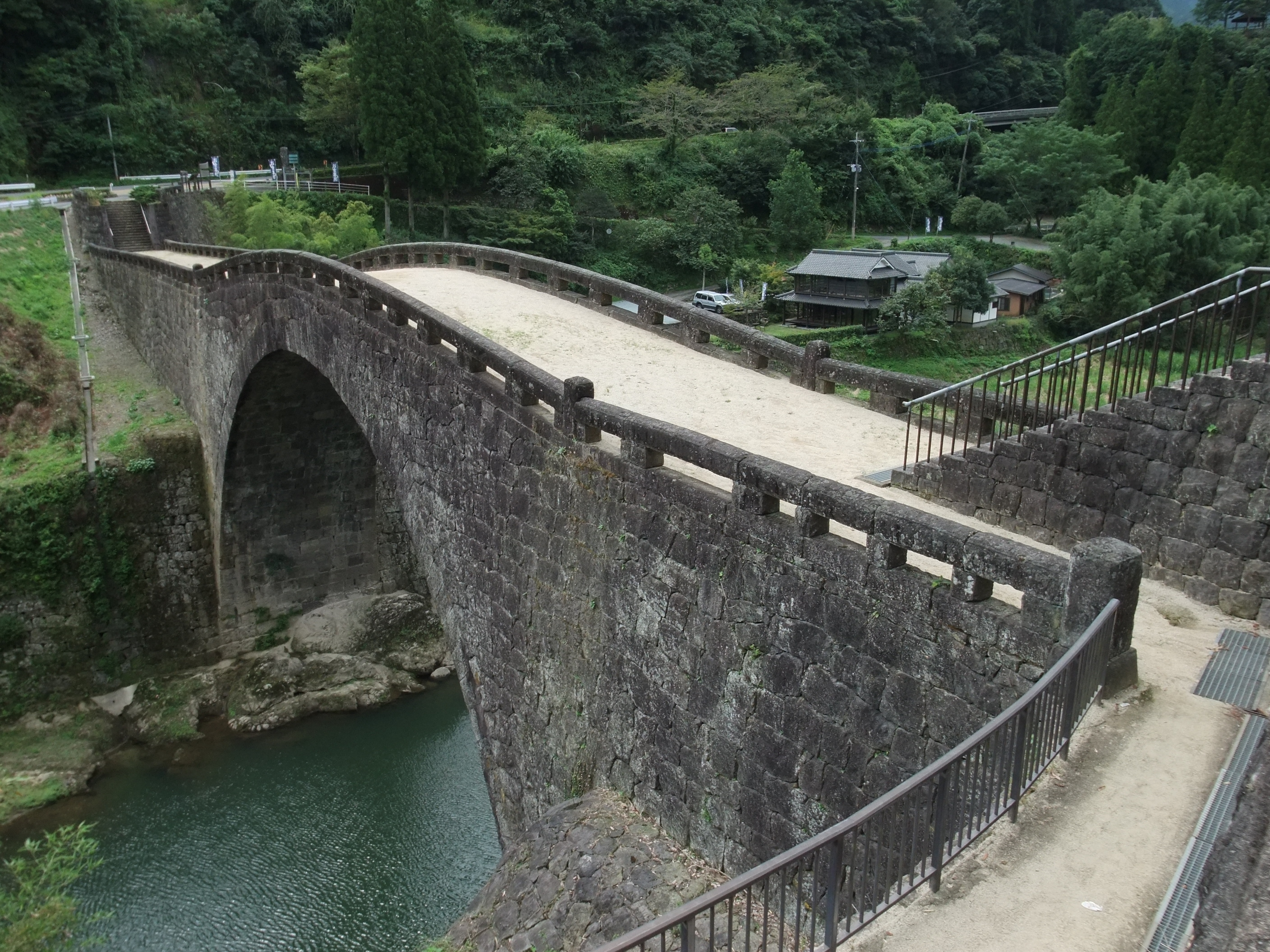 熊本県美里町の霊台橋